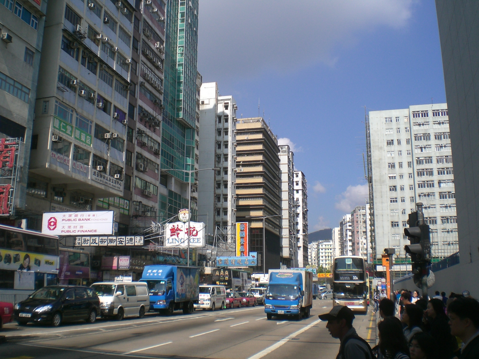 彌敦道, Nathan Road, Kowloon, Hong Kong.